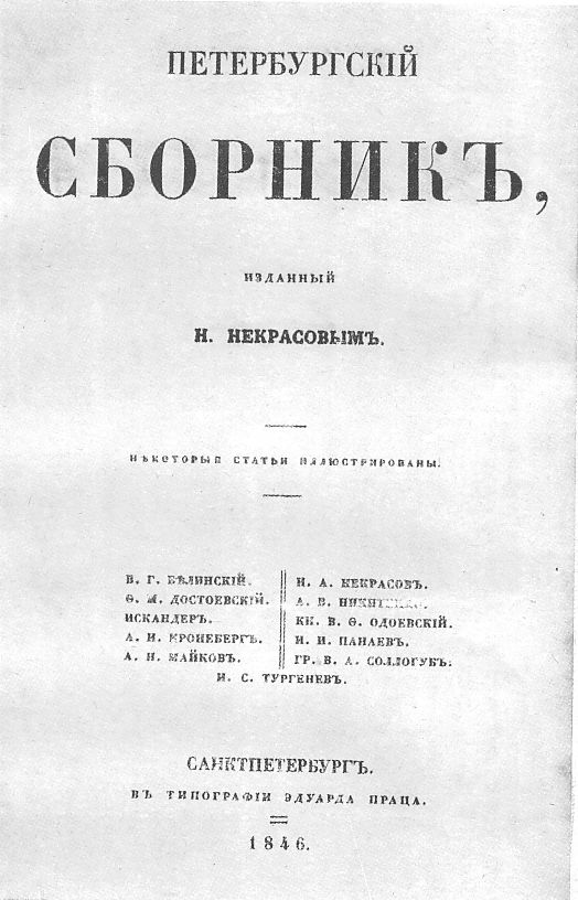 Титульный лист «Петербургского сборника», 1846 г.